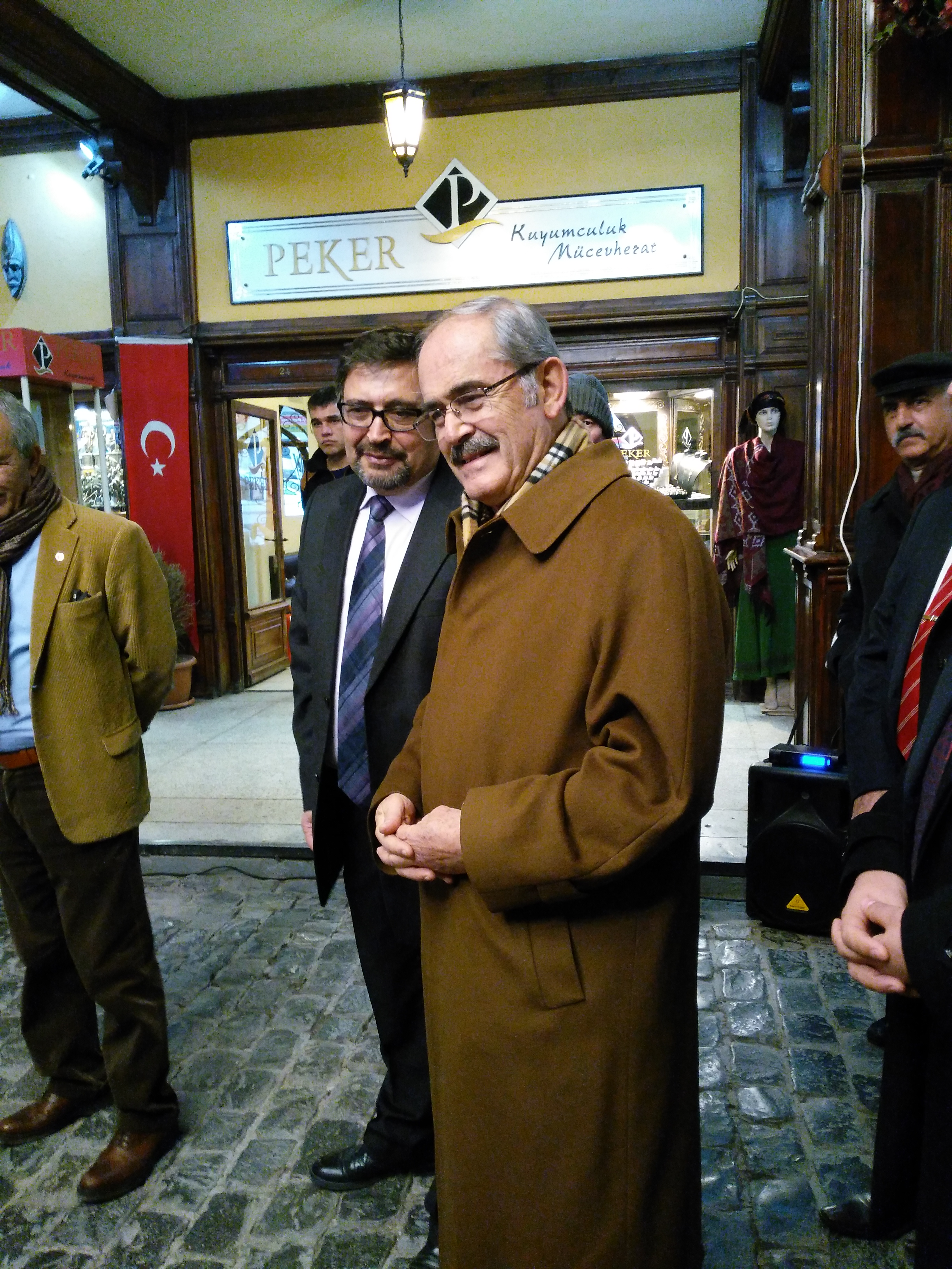 Yılmaz Büyükerşen Turan Kaplan'a ait bir resim sergisinde